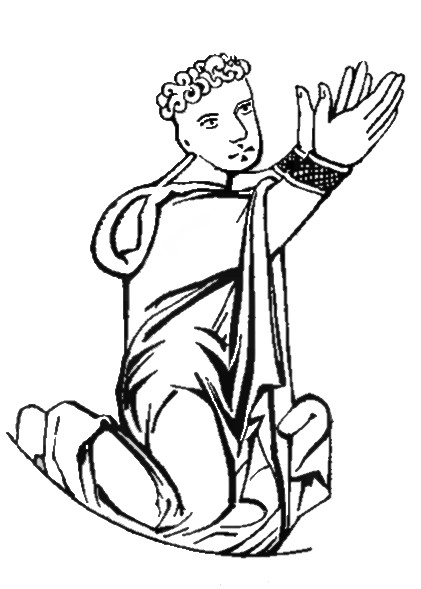 Kazimierz I kujawski on paten of Płock (XIII century)